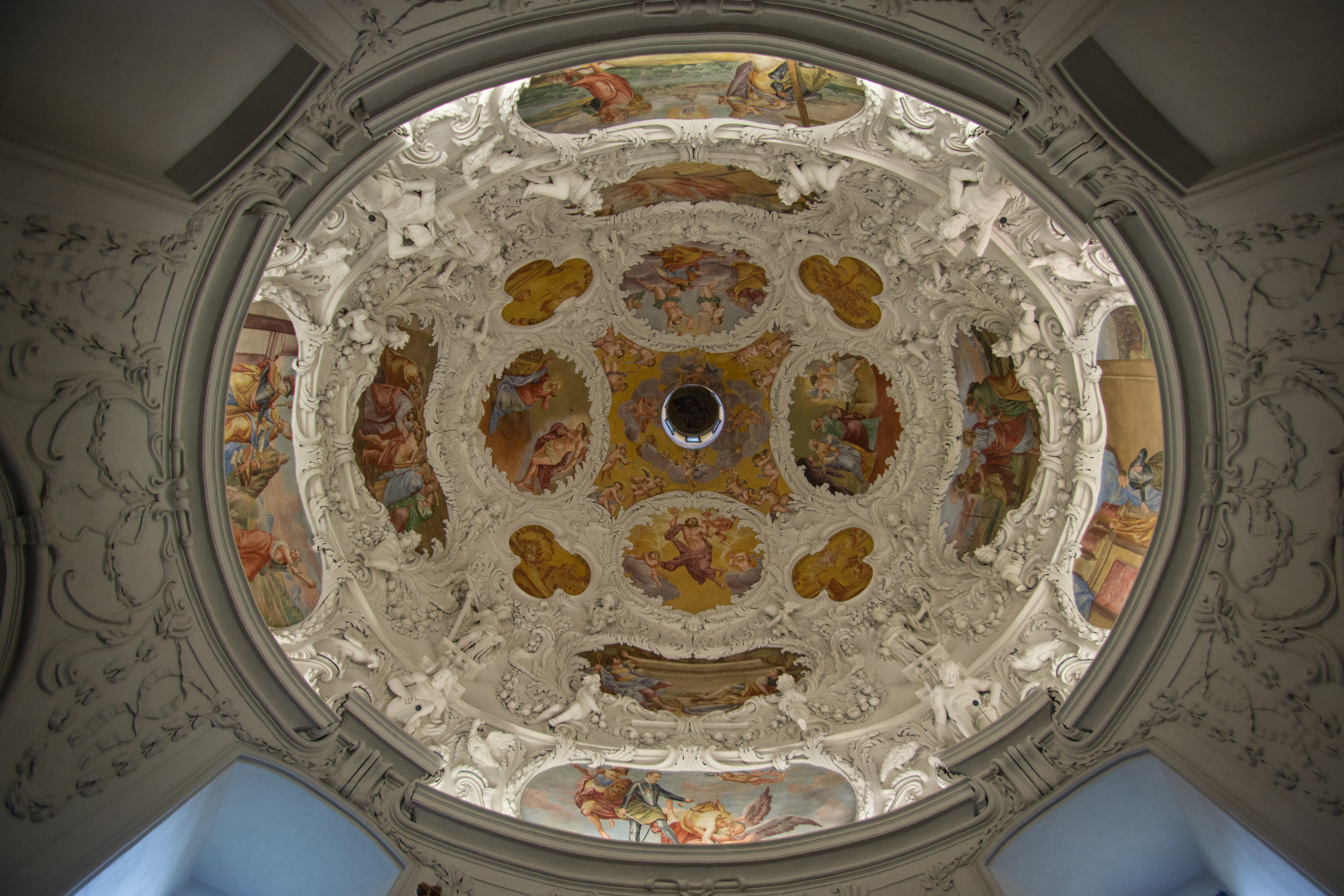 Iglesia de Santa Catalina y Mausoleo. Cúpula lateral